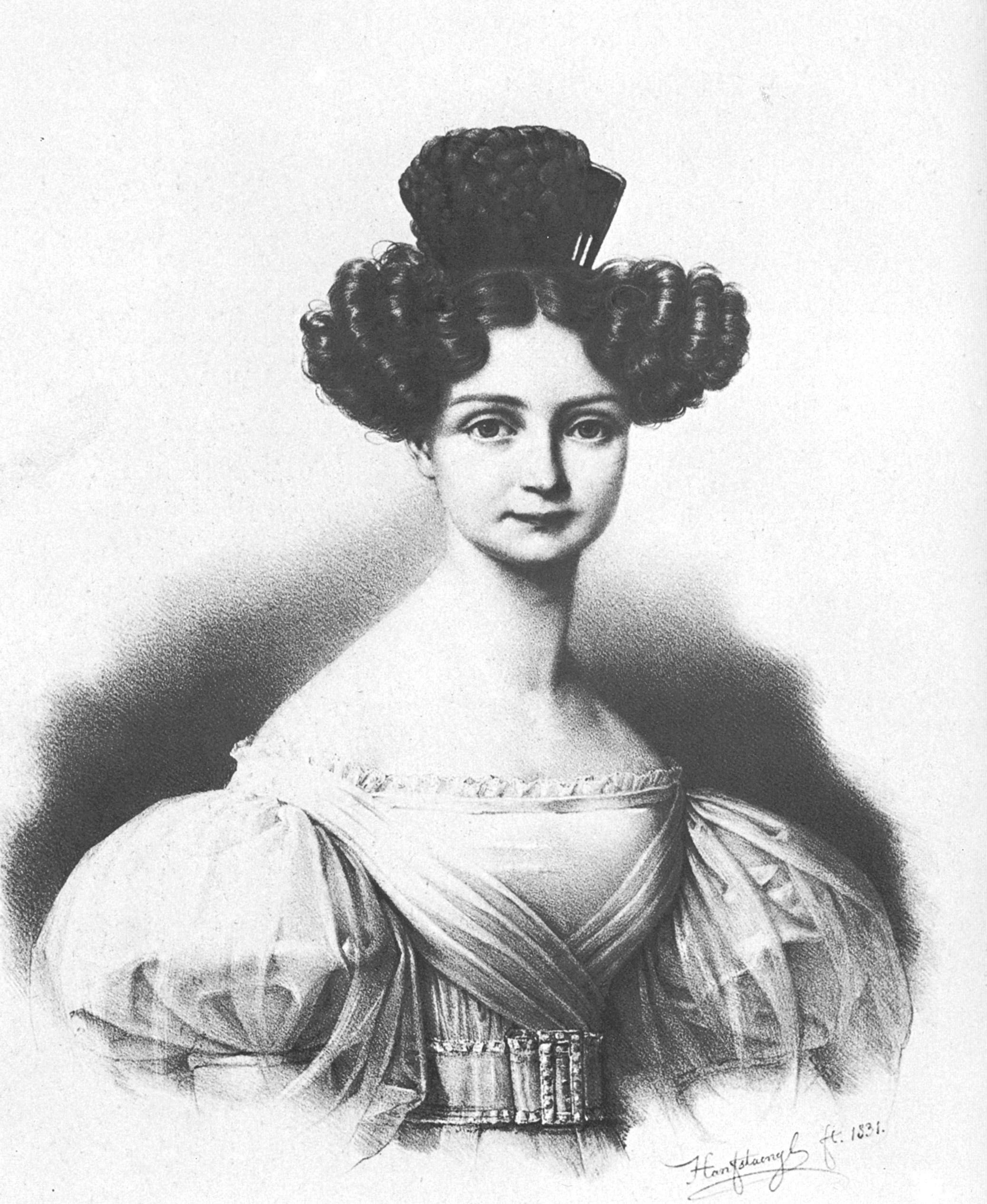 Prinzessin Mathilde von Bayern (1813-1862), Lithography